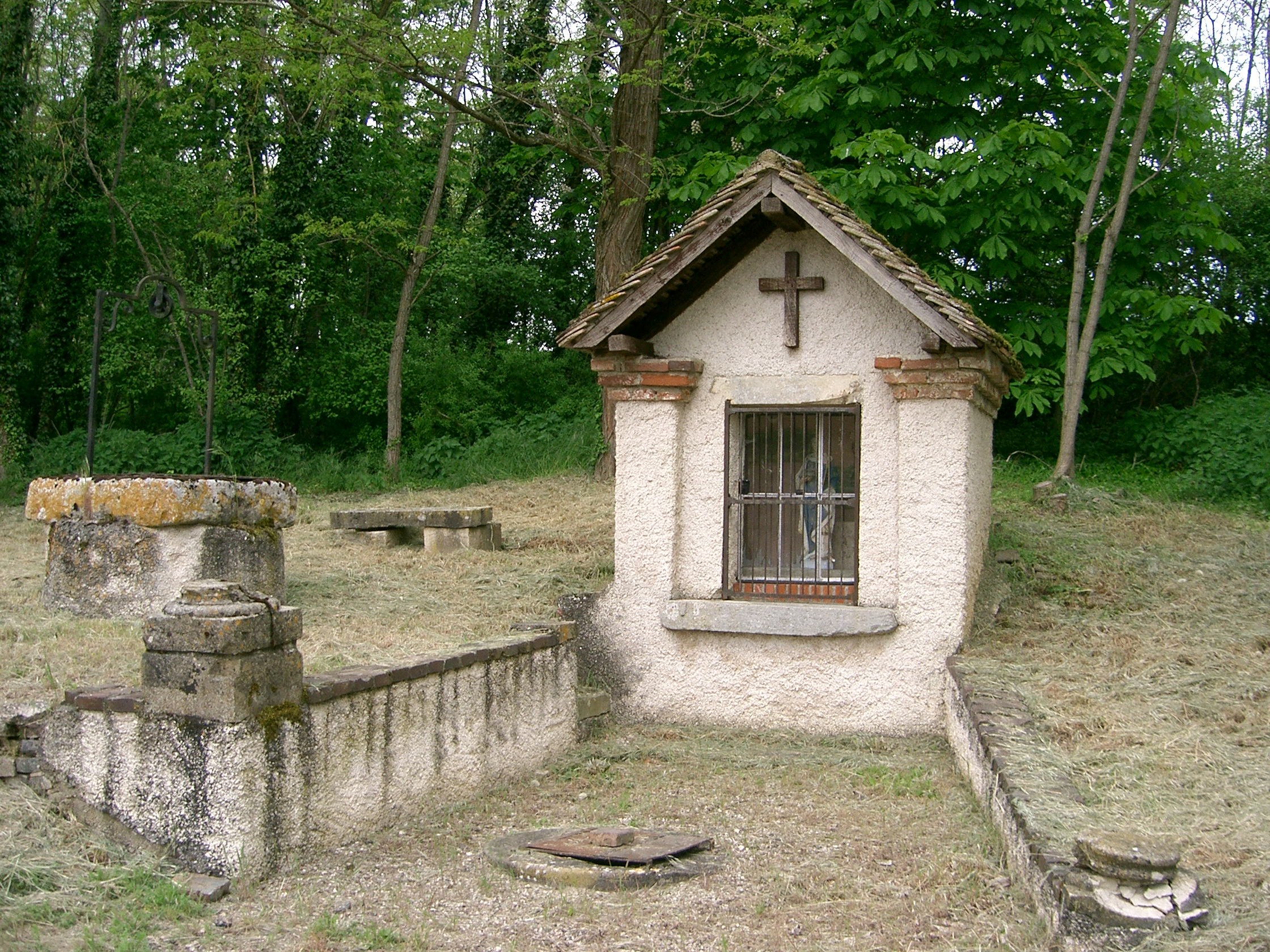 chapelle Saint Louis édifiée au XIXe siècle à l'emplacement de l'abbaye de Molaise détruite (Ecuelles - Saône-et-Loire , France)